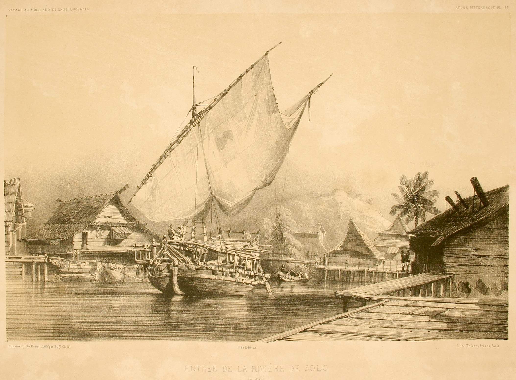 Entrée de la rivière de Solo. Atlas pittoresque, planche 139.